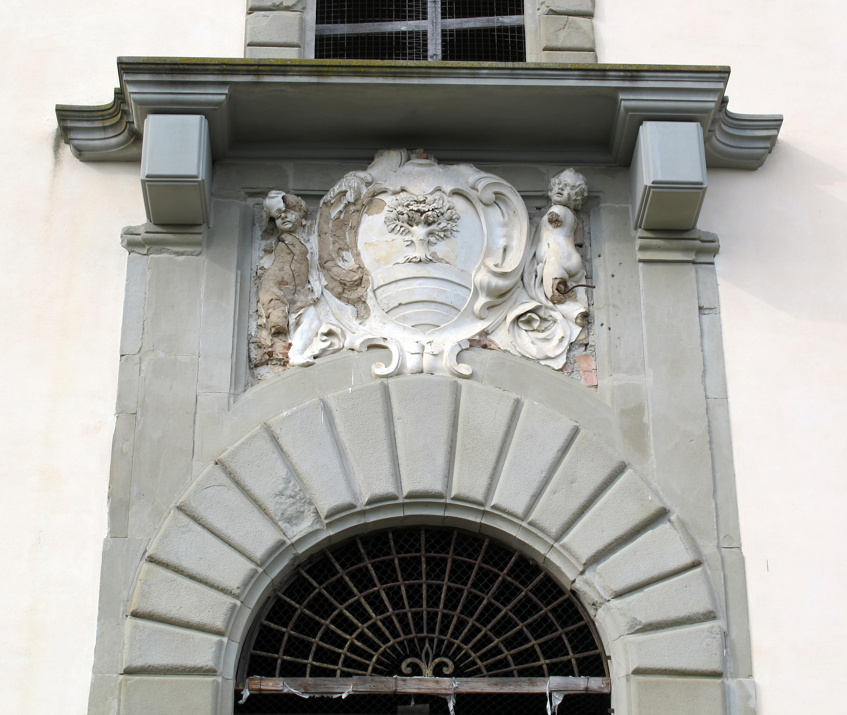 Villa del Barone, Montemurlo